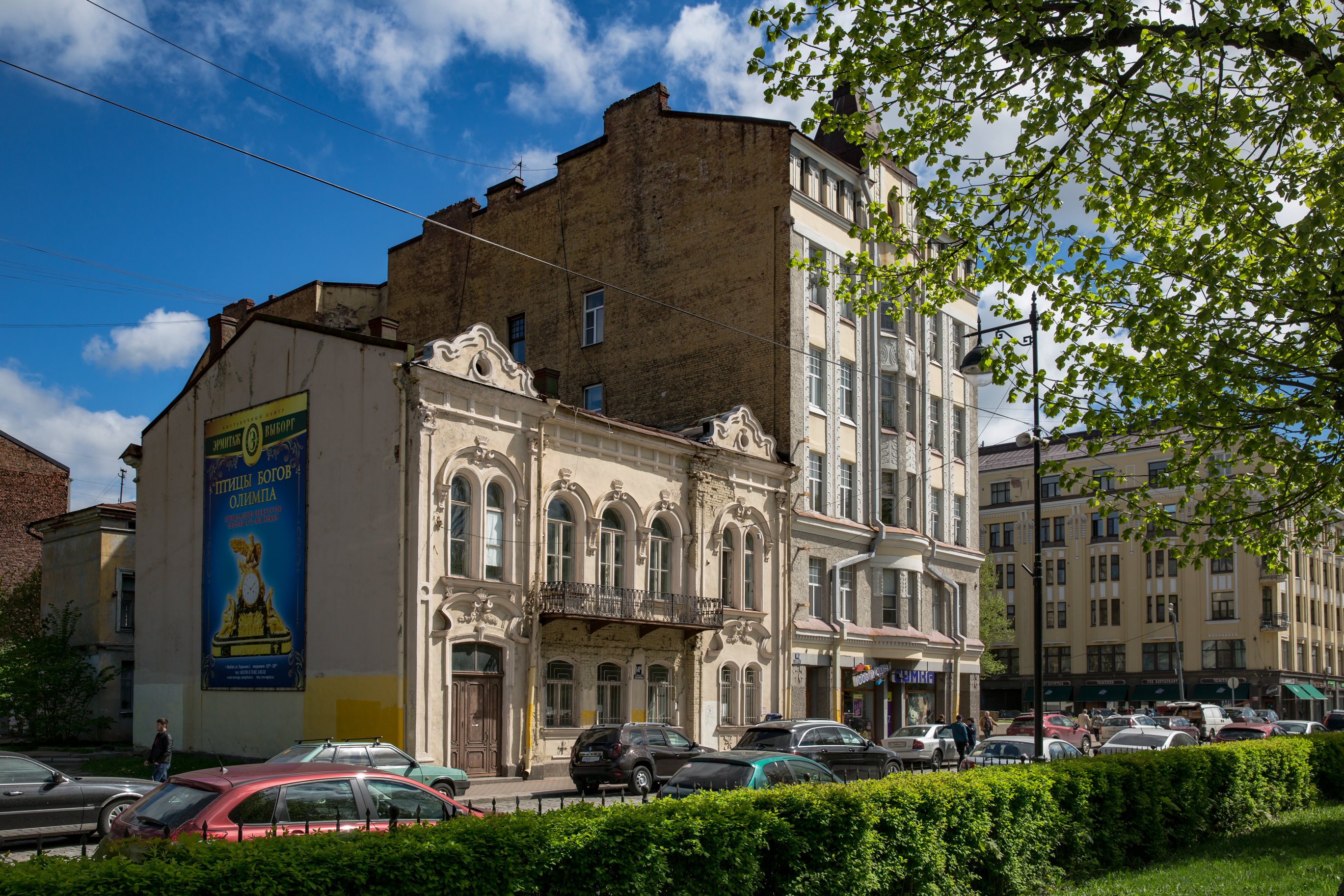 Vyborg, Russia Finnish architecture designed before WW2. Vyborg was part of Finland before WW2. It was ceded to Russia after the war. VirtuaaliViipuri: Arkkitehti Paavo Uotila teki suunnitelman vuonna 1908 5-kerroksisen liike- ja asuintalon rakentamiseksi Torkkelinkadulle. Rakennuksen omisti Konkonen. Tässä rakennuksessa oli mm. Viipurin Keskus-apteekki ja ravintola Aula. Torkkelinkatu 16 Vasemmalla kauppias Sergejeffin kaksikerroksinen rokokootyylinen palatsi. Arkkitehti Fredrik August Odenwall.